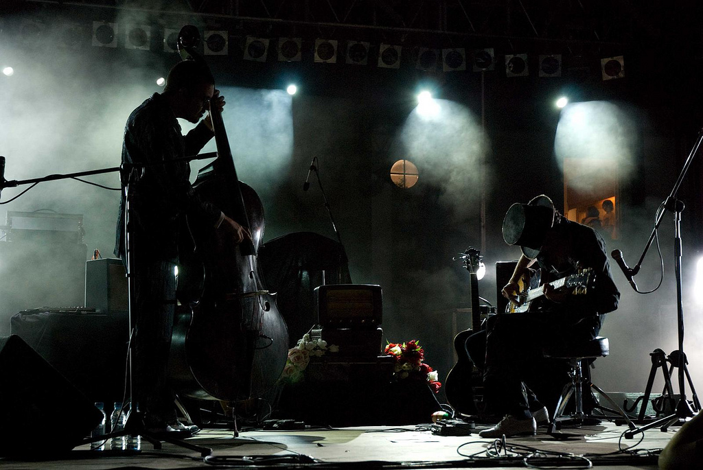 Dead Combo no Festival M.U.N.D.O. em Viana do Castelo. Camera: Nikon D80 Lens : AF-S DX Nikkor 18-70mm f/3.5-4.5G IF-ED